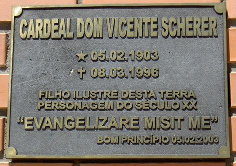 Die Gedenktfael für Dom Vicente Scherer in Bom Princípio